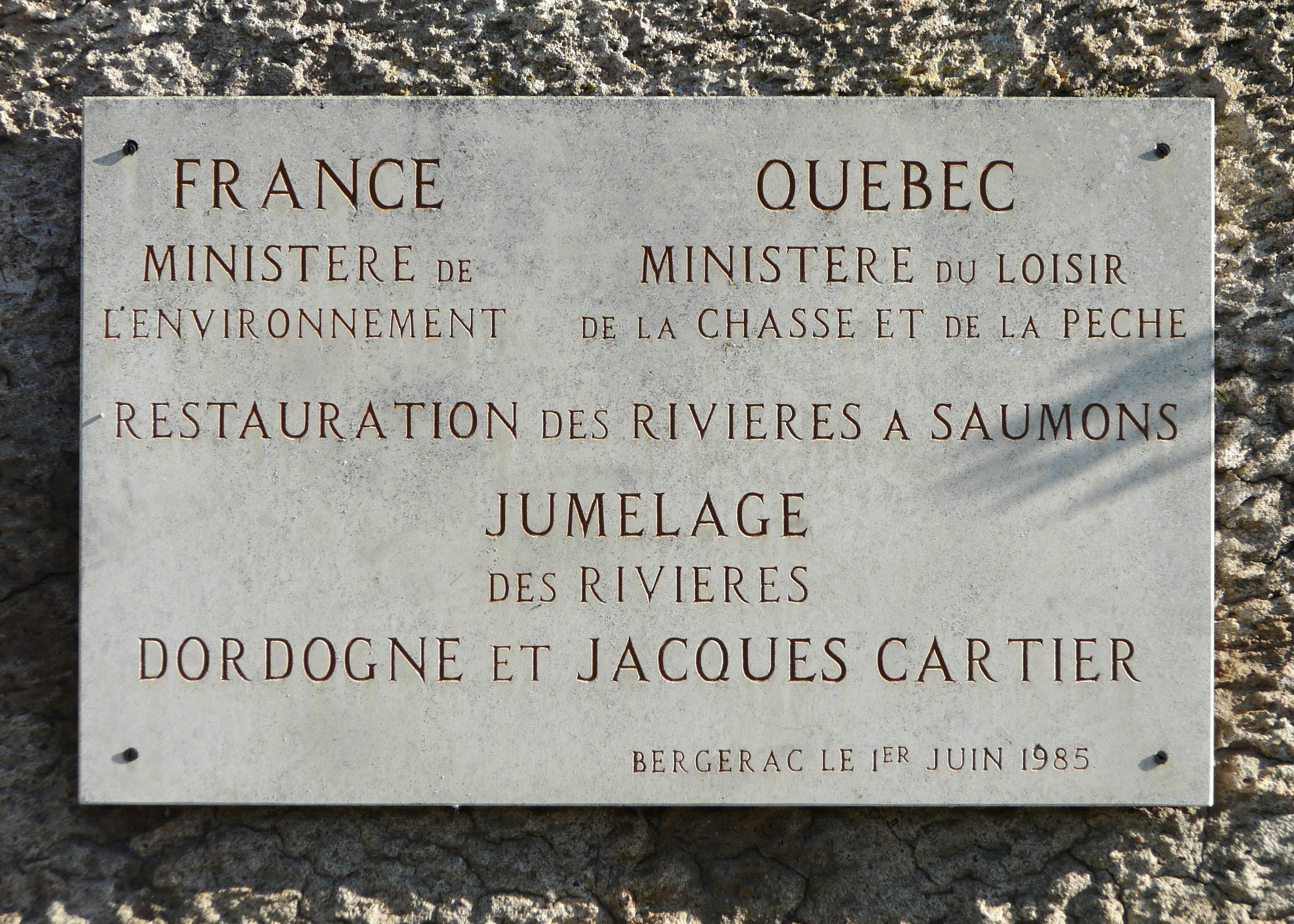 Sur le site du barrage de Bergerac, plaque attestant du jumelage entre la Dordogne et la rivière Jacques-Cartier.